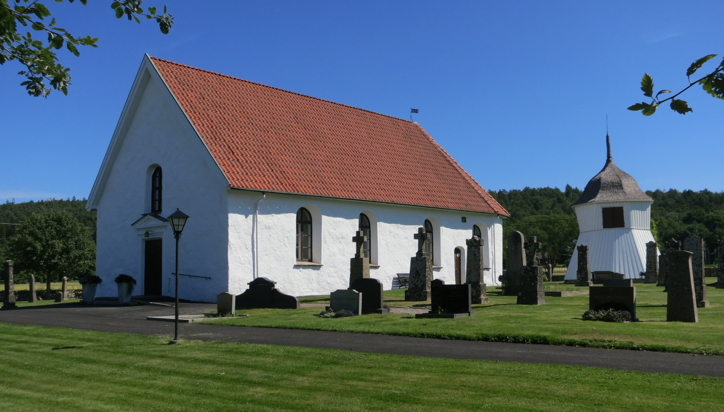 Stråvalla kyrka i norra Halland